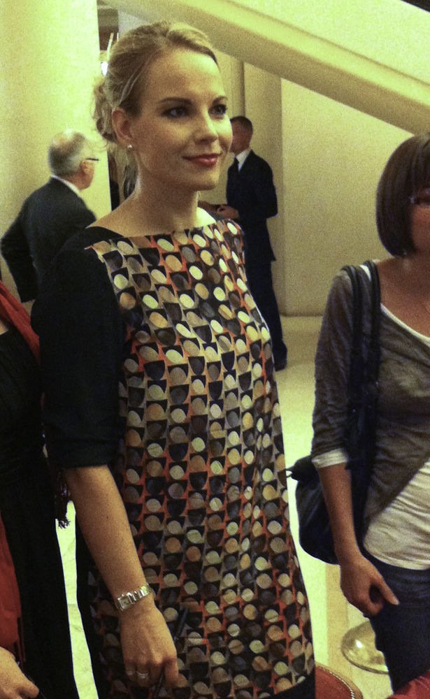 Paris 13102012